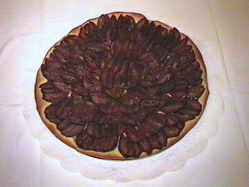 Pflaumenkuchen, a popular German pie